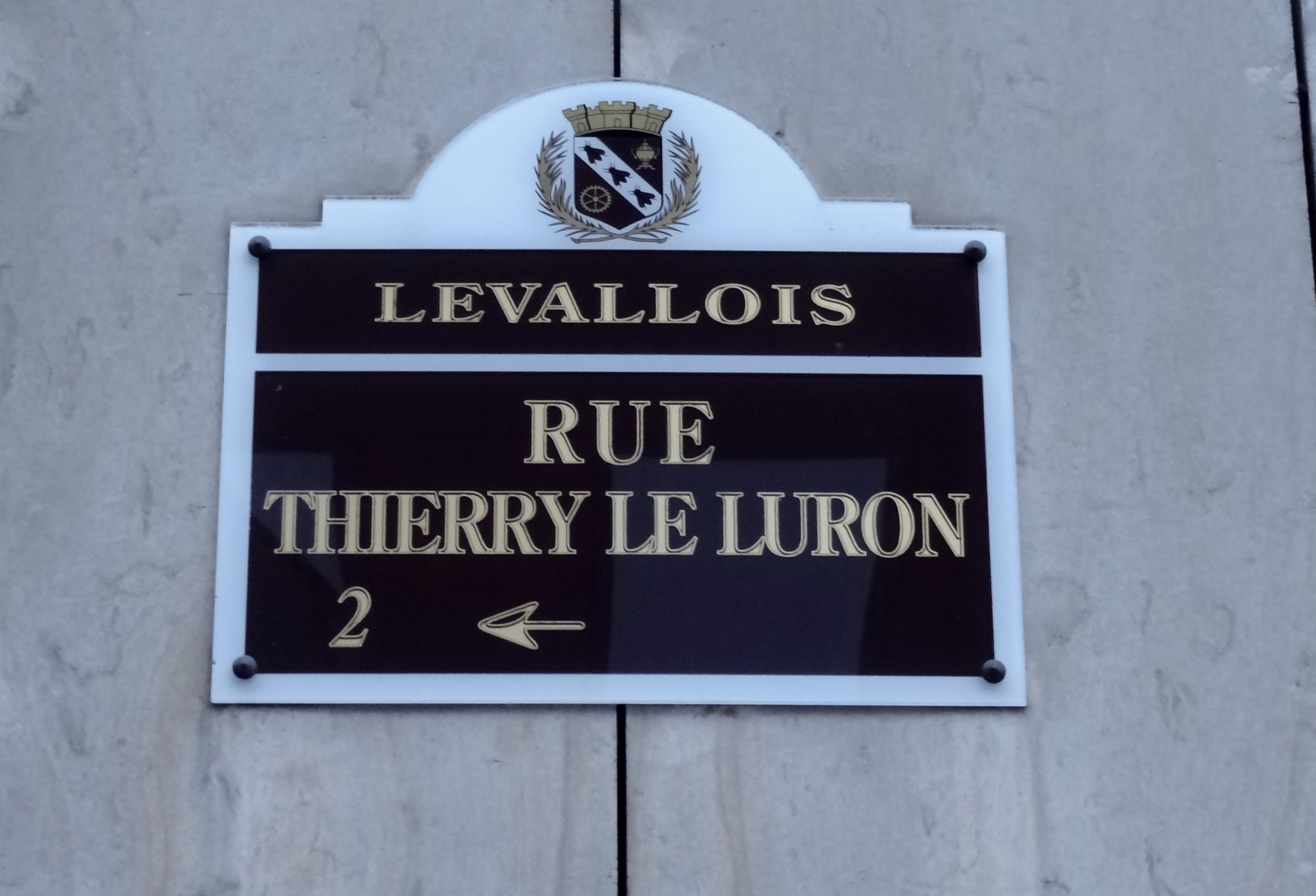 La rue Thierry Le Luron à Levallois-Perret (Hauts-de-Seine, France).